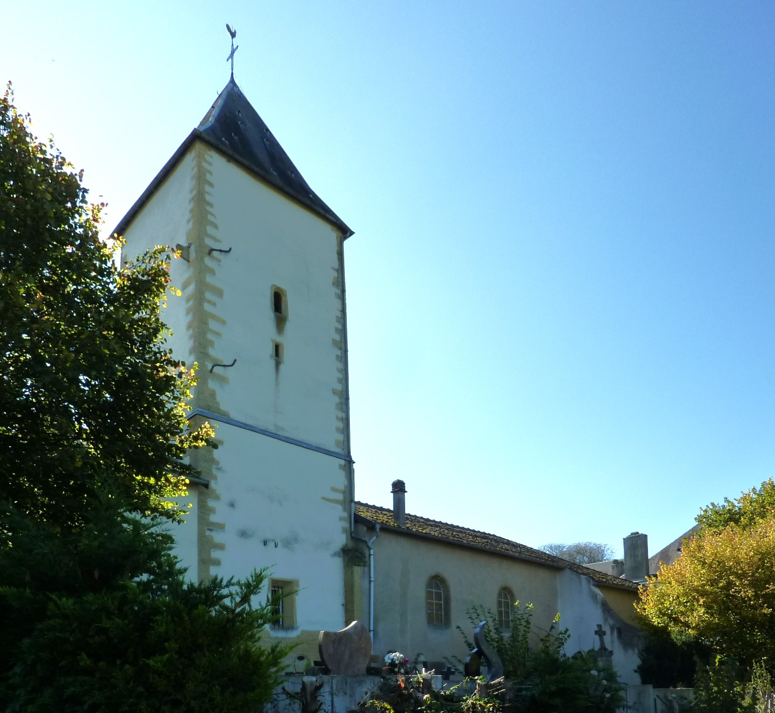 Église St-Étienne de Puxe